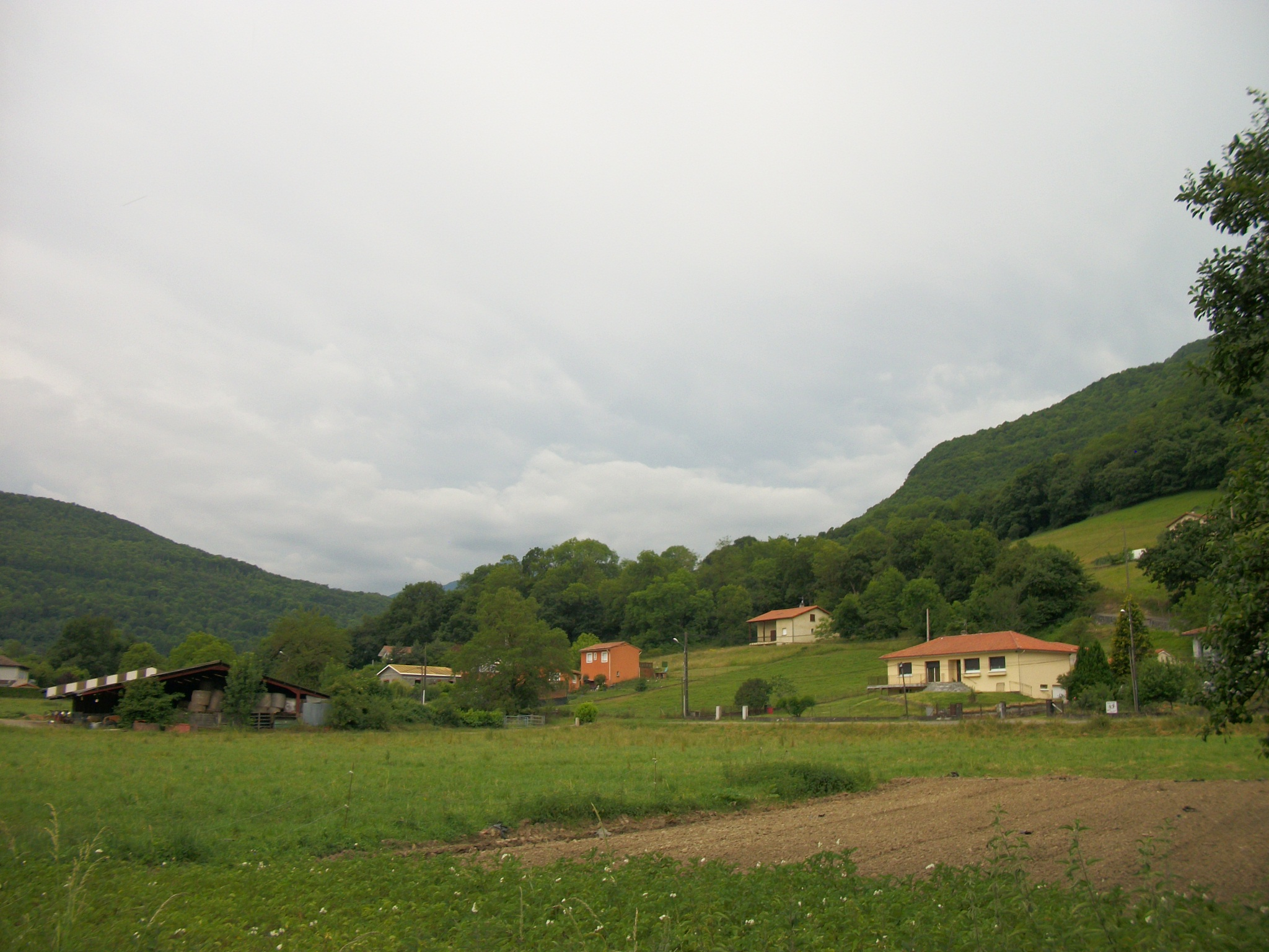 Bagiry